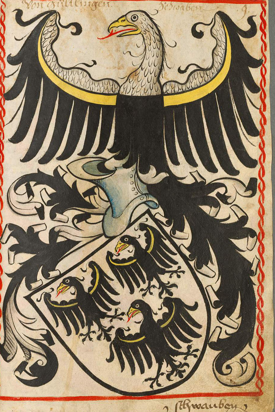 Scheibler'sches Wappenbuch, älterer Teil Gültlingen